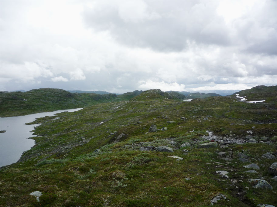 Bykle heia i Setesdal Vesthei Ryfylkeheiane landskapsvernområde